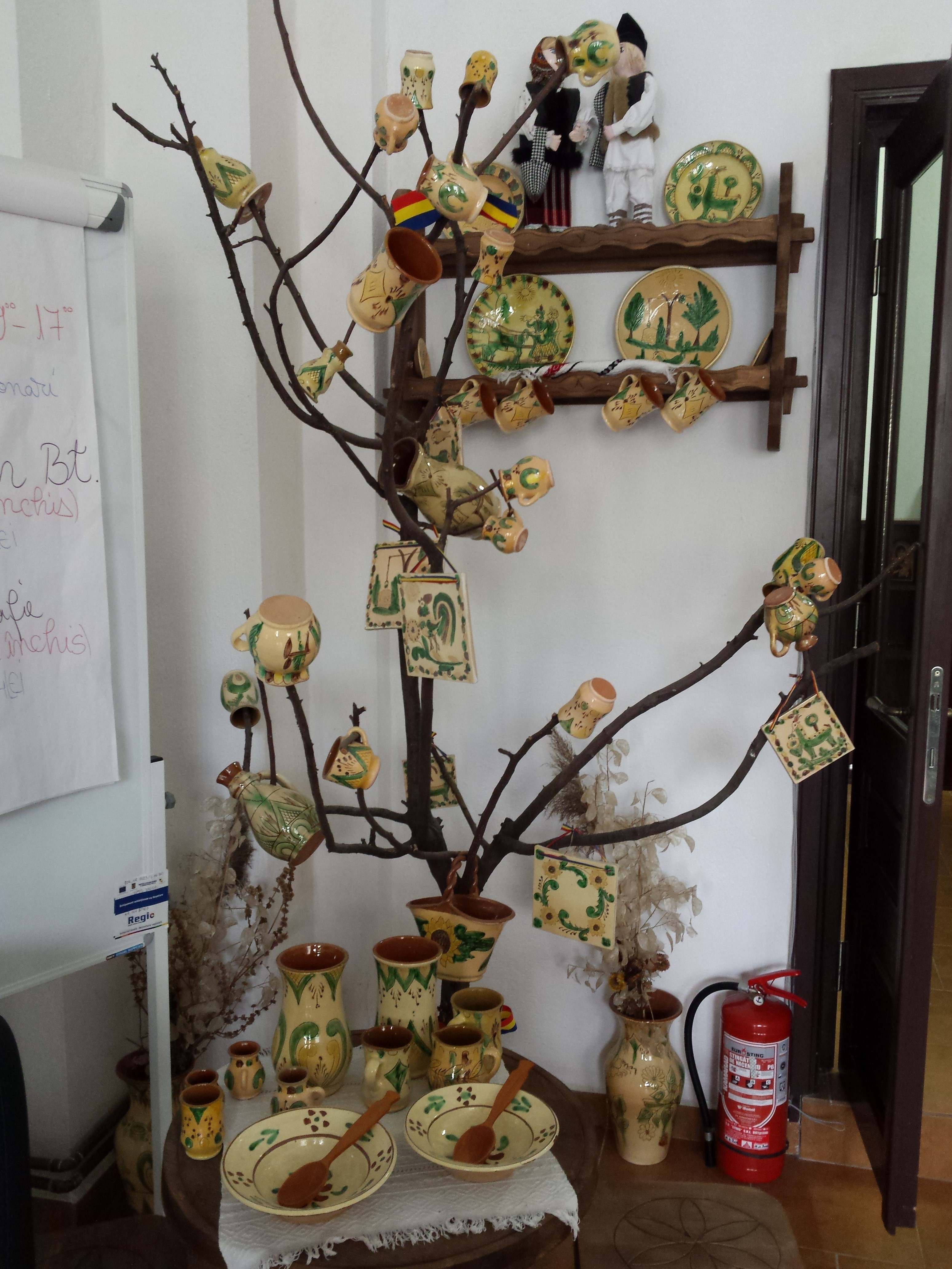 kuty